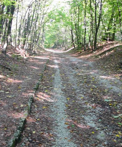 Überreste des Hellwegs im Teutoburger Wald bei Bielefeld